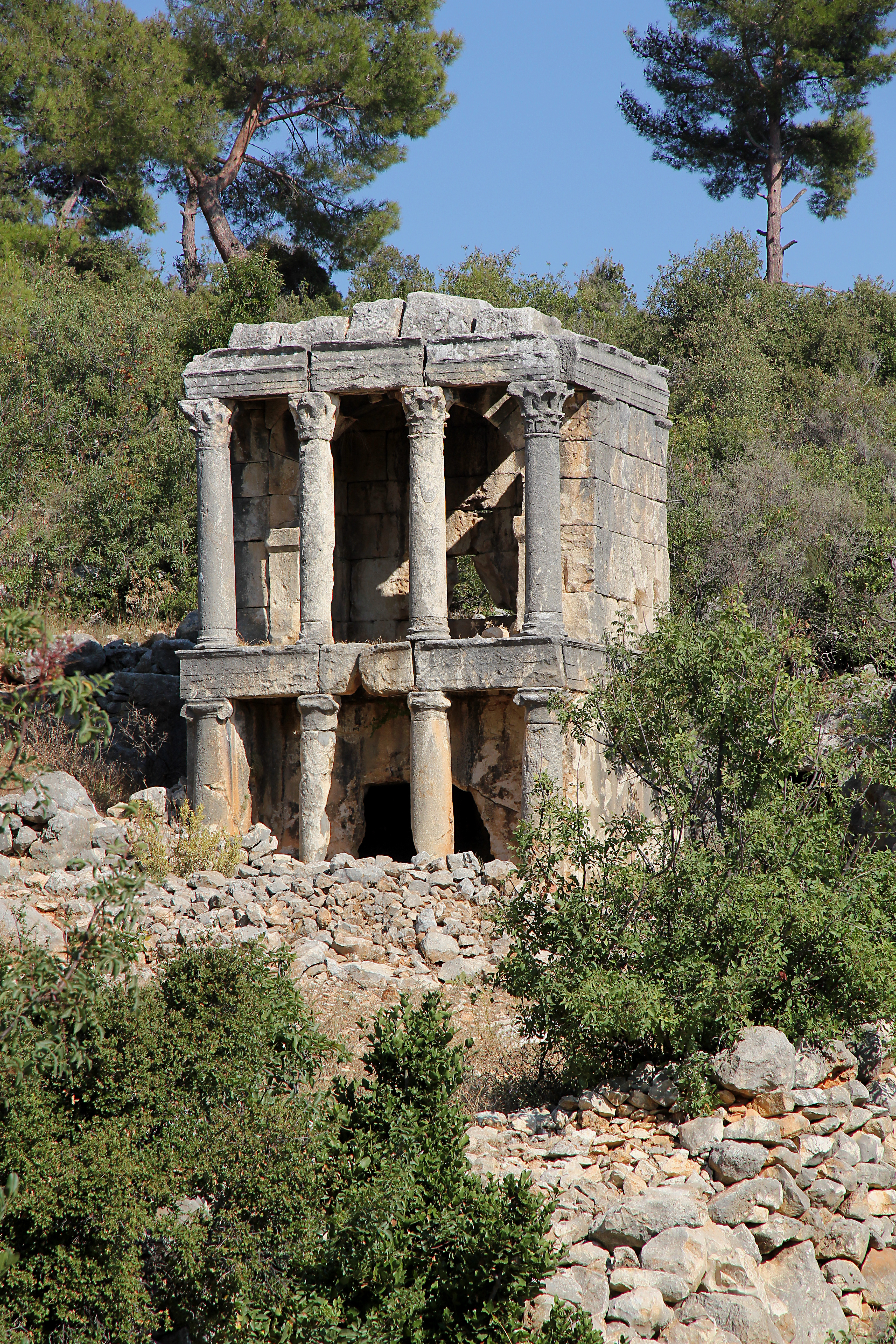 Hausgrab in Imbriogon, heute Demircili bei Silifke, Südtürkei